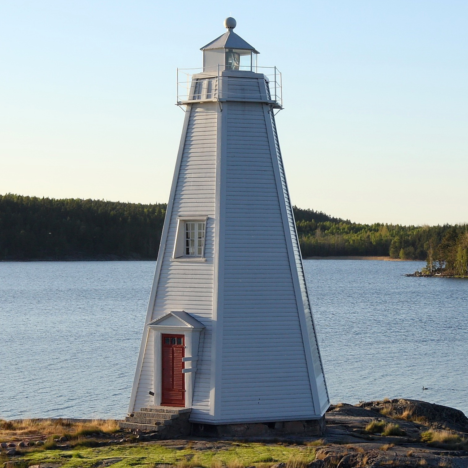 Staviks fyr, nymålad 2008 och sedan 2003 klädd i original träpanel. Byggt år 1860